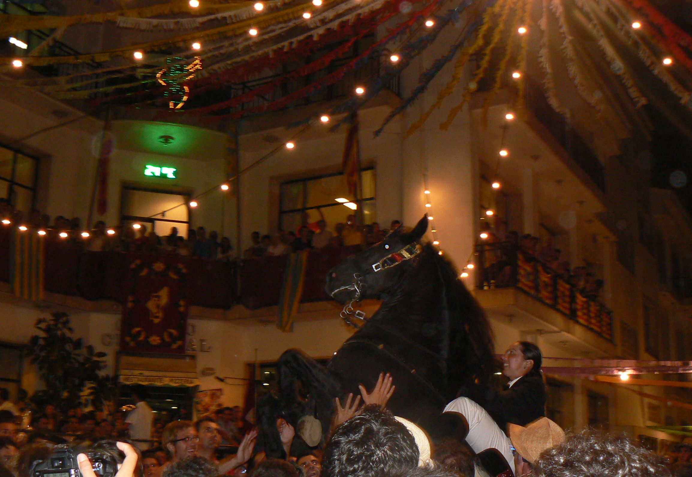 Jaleo a les festes de Sant Llorenç de 2010, a Alaior (Menorca).